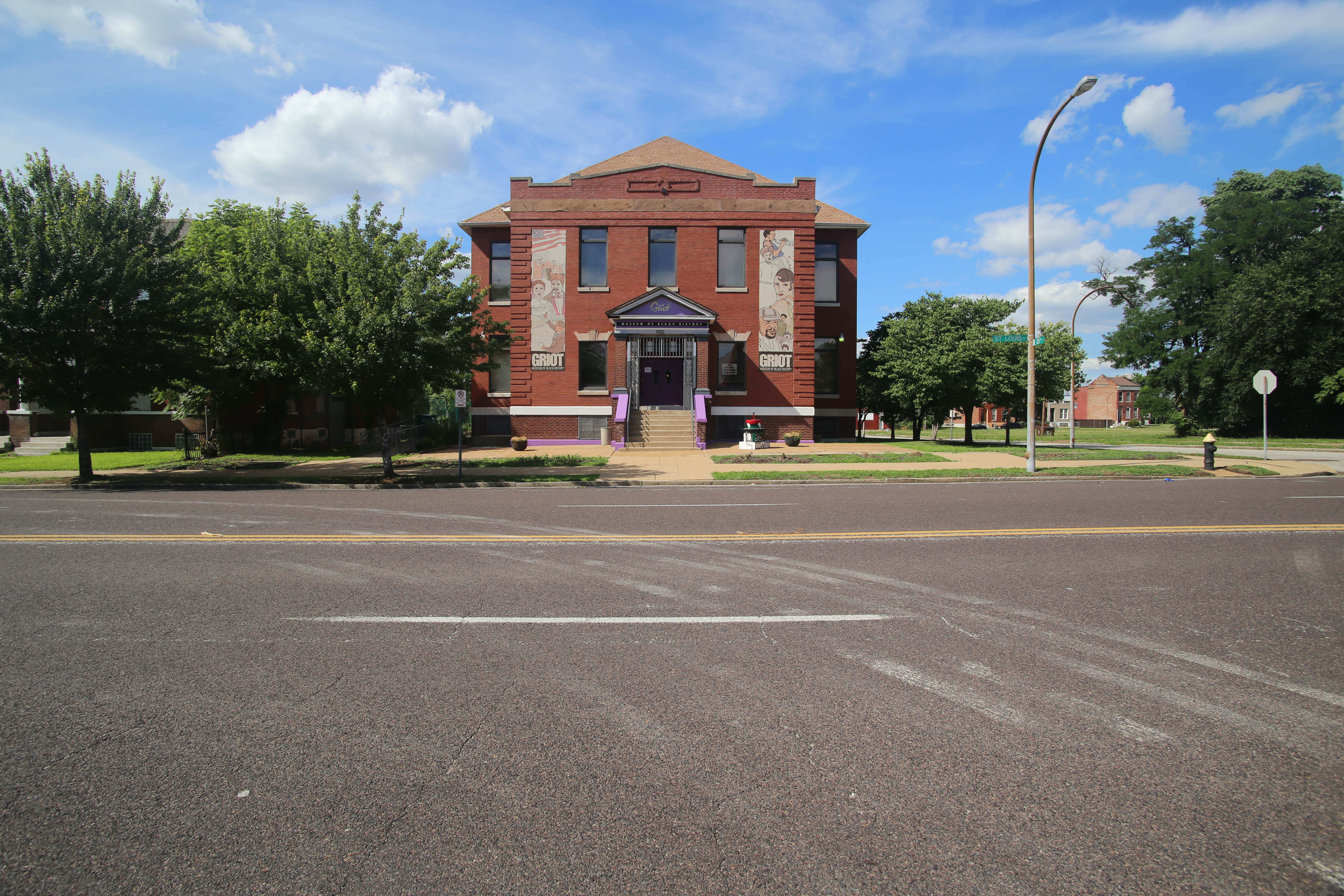 Griot Museum